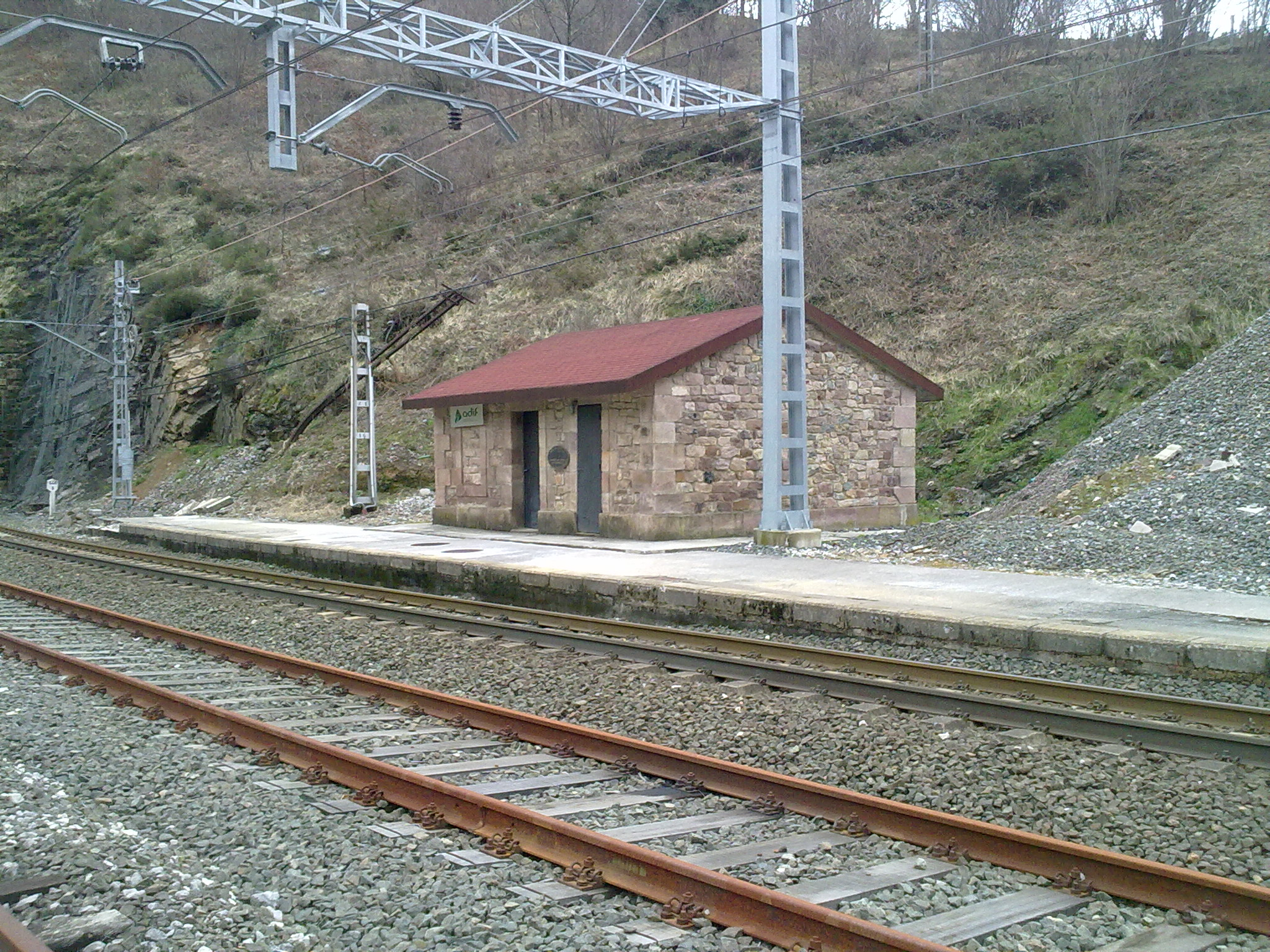 Vista del apartadero de Montabliz en abril de 2015.